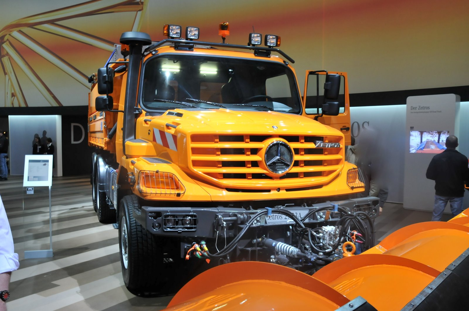 MB Zetros